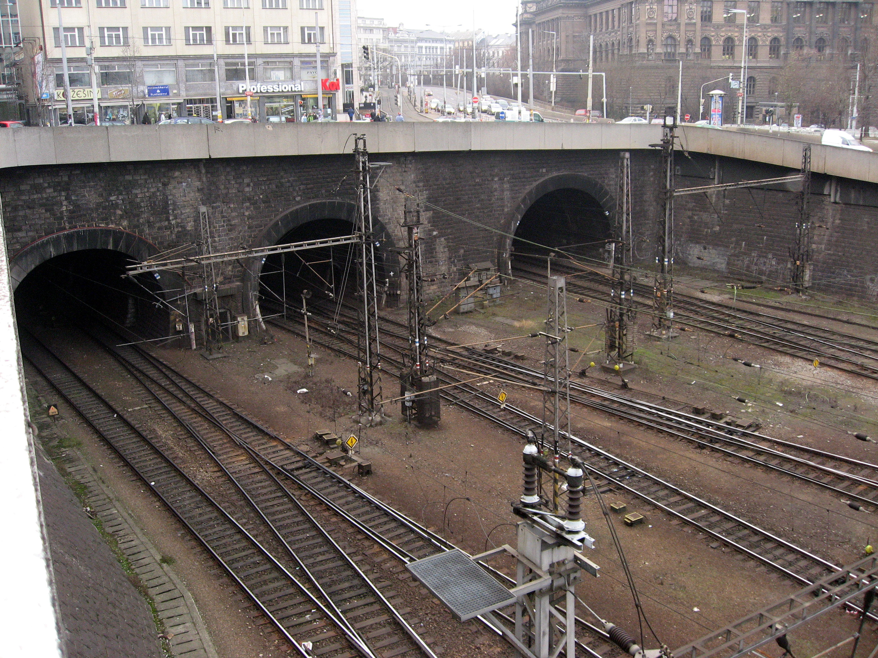 Železniční tunely, foceno od Španělské ulice